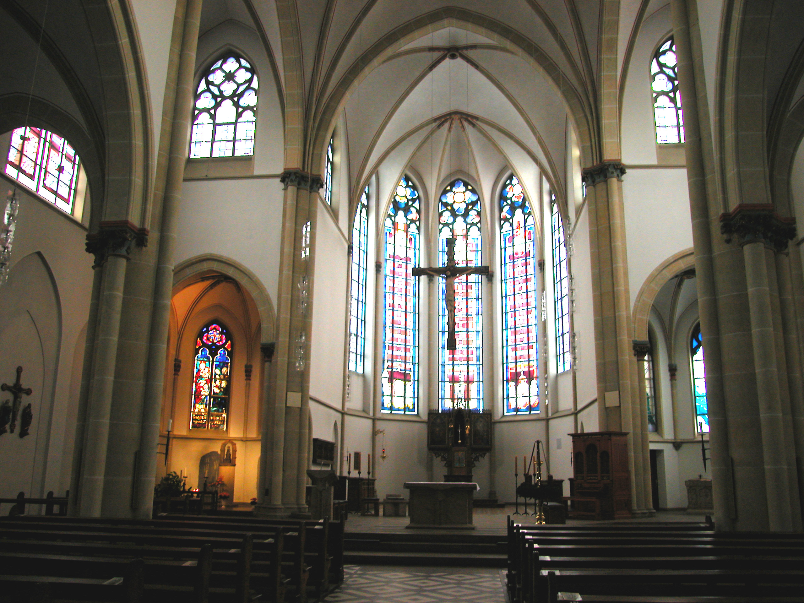 Innenraum St. Marienkirchen. Luenen (de); Внутренний вид церкви св. Марии. Люнен (ru).